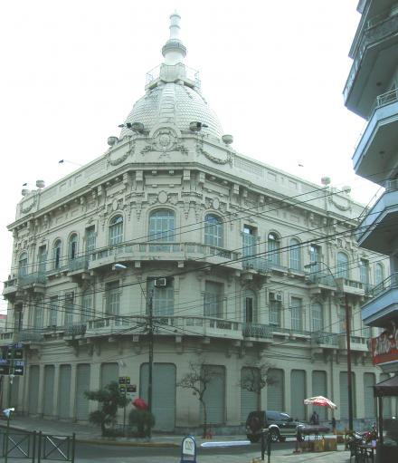 El edificio del Ministerio de Hacienda se encuentra ubicado en el centro de Asunción, en la esquina del Panteón Nacional de los Héroes.